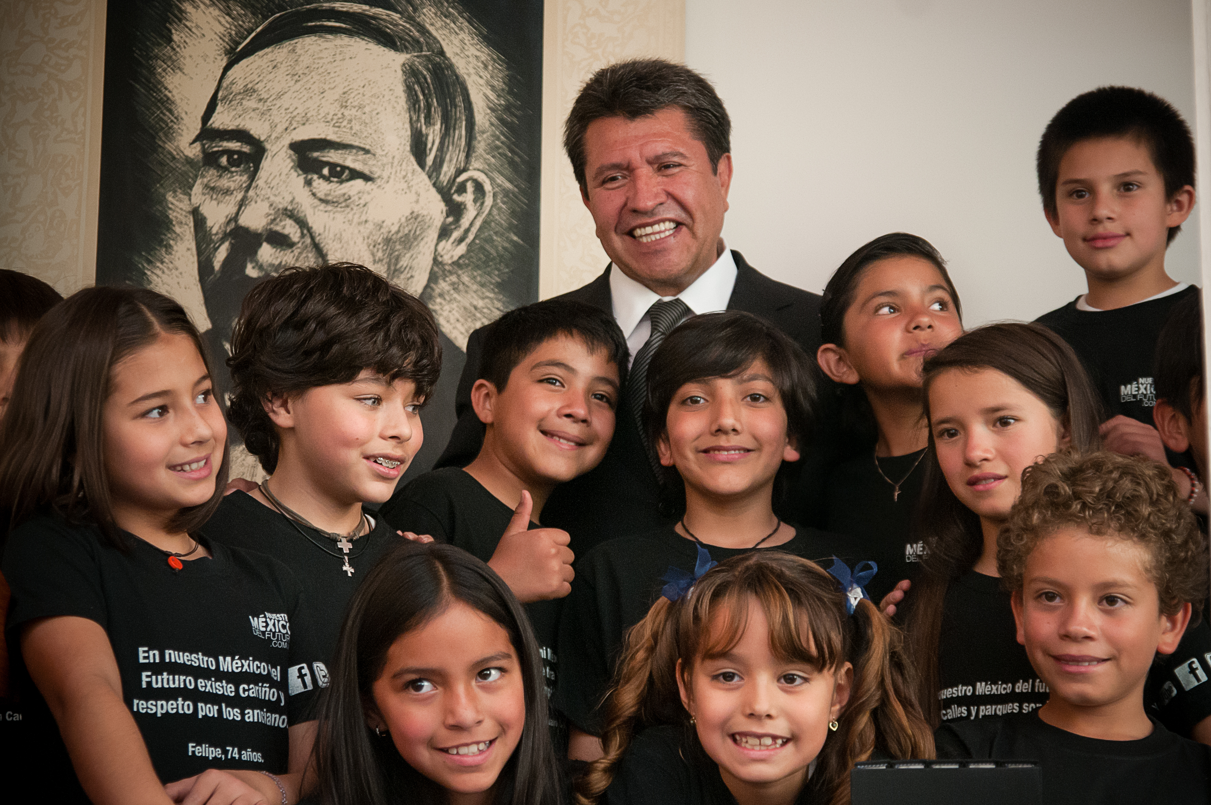 Le entregaron a Monreal, coordinador de campaña de AMLO, un libro con propuestas para el siguiente sexenio. AMLO no los pudo recibir pues se encontraba en Michoacán en su cierre de campaña.